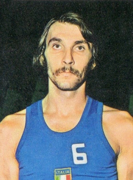 EDIS CALCIATORI 1975/76-Figurina n.345- BERTOLOTTI - BASKET -Rec